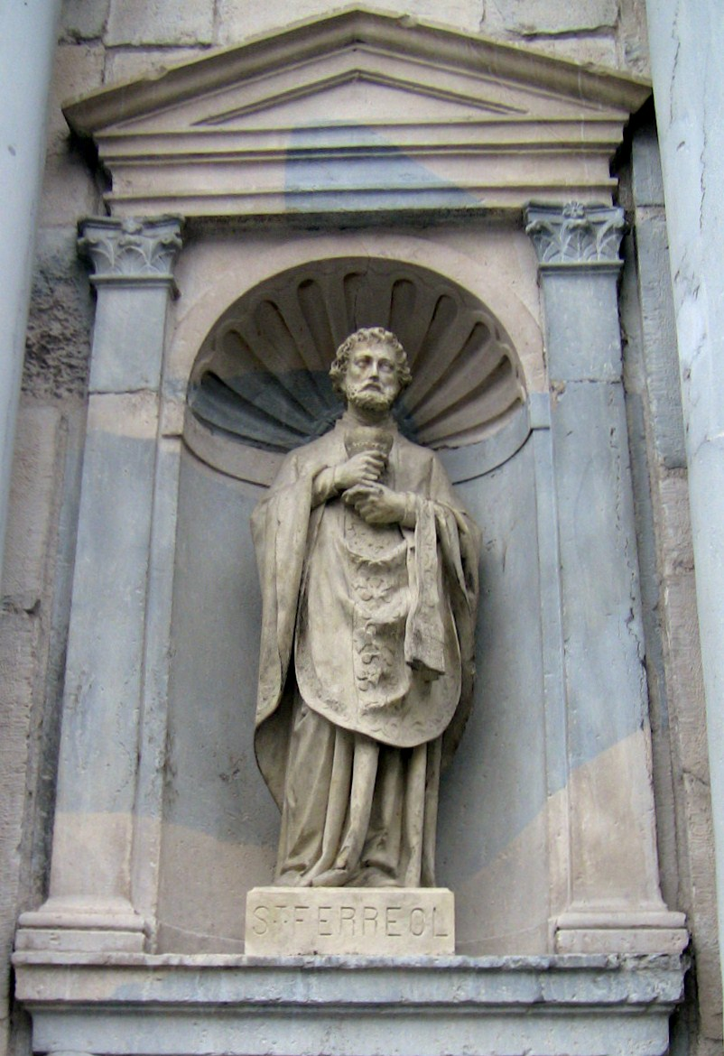 Statue de Saint-Férréol sur une façade de l'église Notre-Dame de Besançon (Doubs, France).